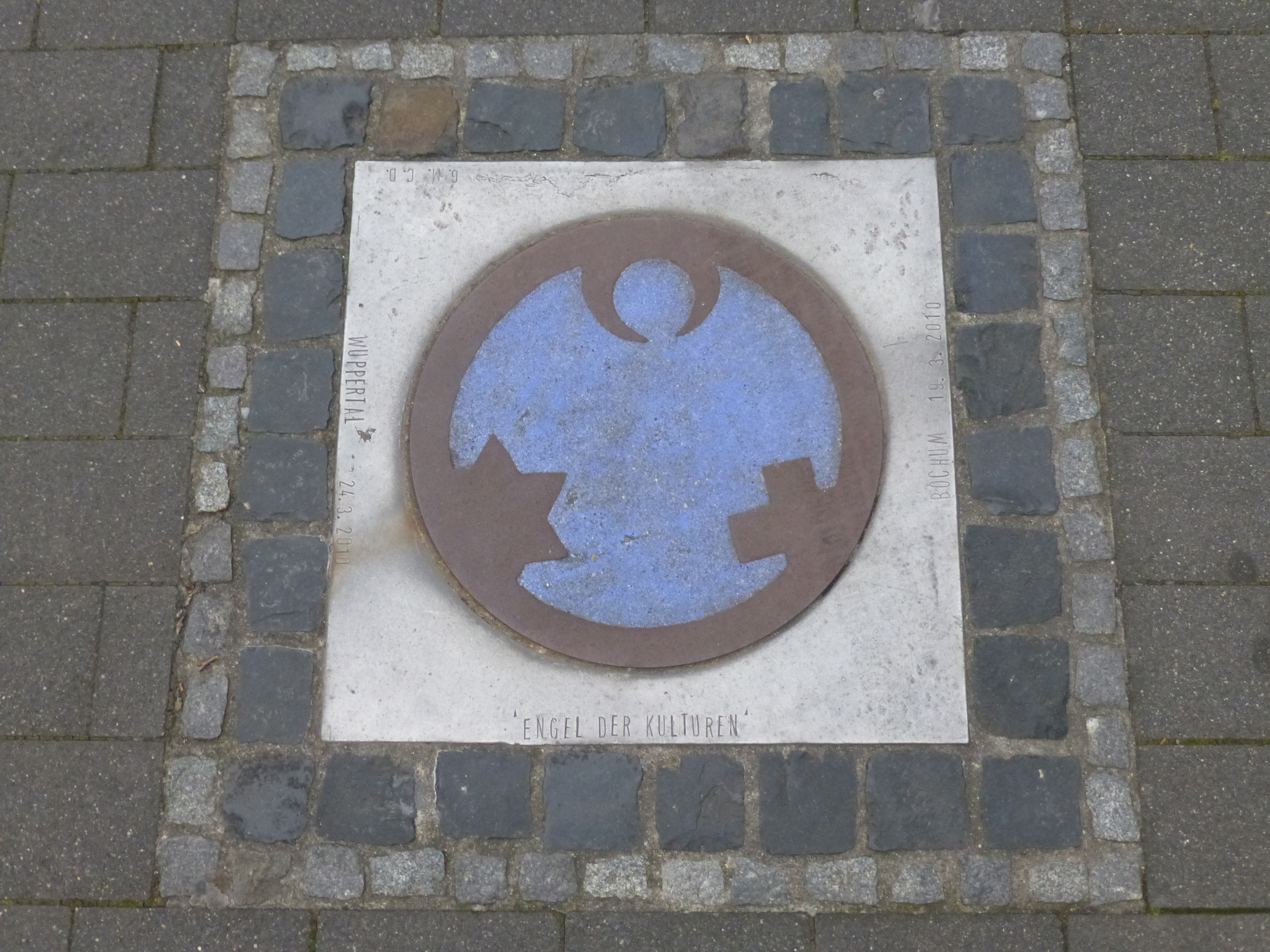 Haspeler Straße, Wuppertal